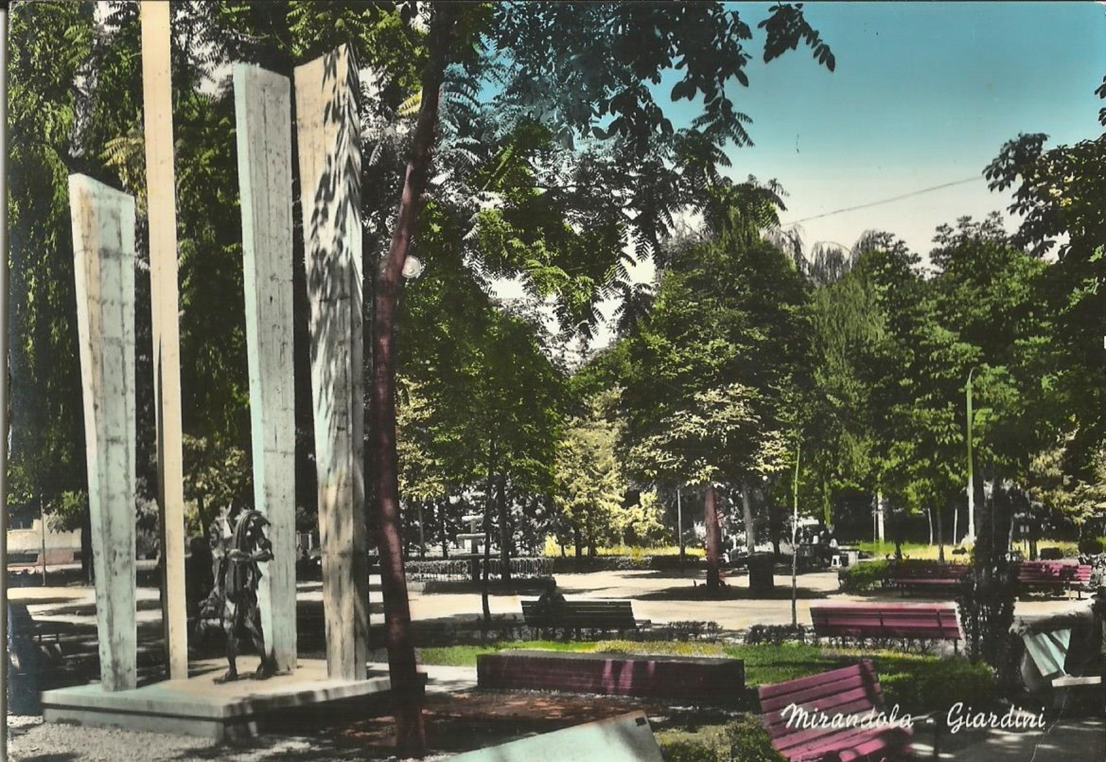 Il giardino "Nino Lolli" a Mirandola, con il monumento a Francesco Montanari realizzato nel 1961 in occasione del centenario dell'unità d'Italia dallo scultore Mario Adani e l'architetto Tiziano Lugli